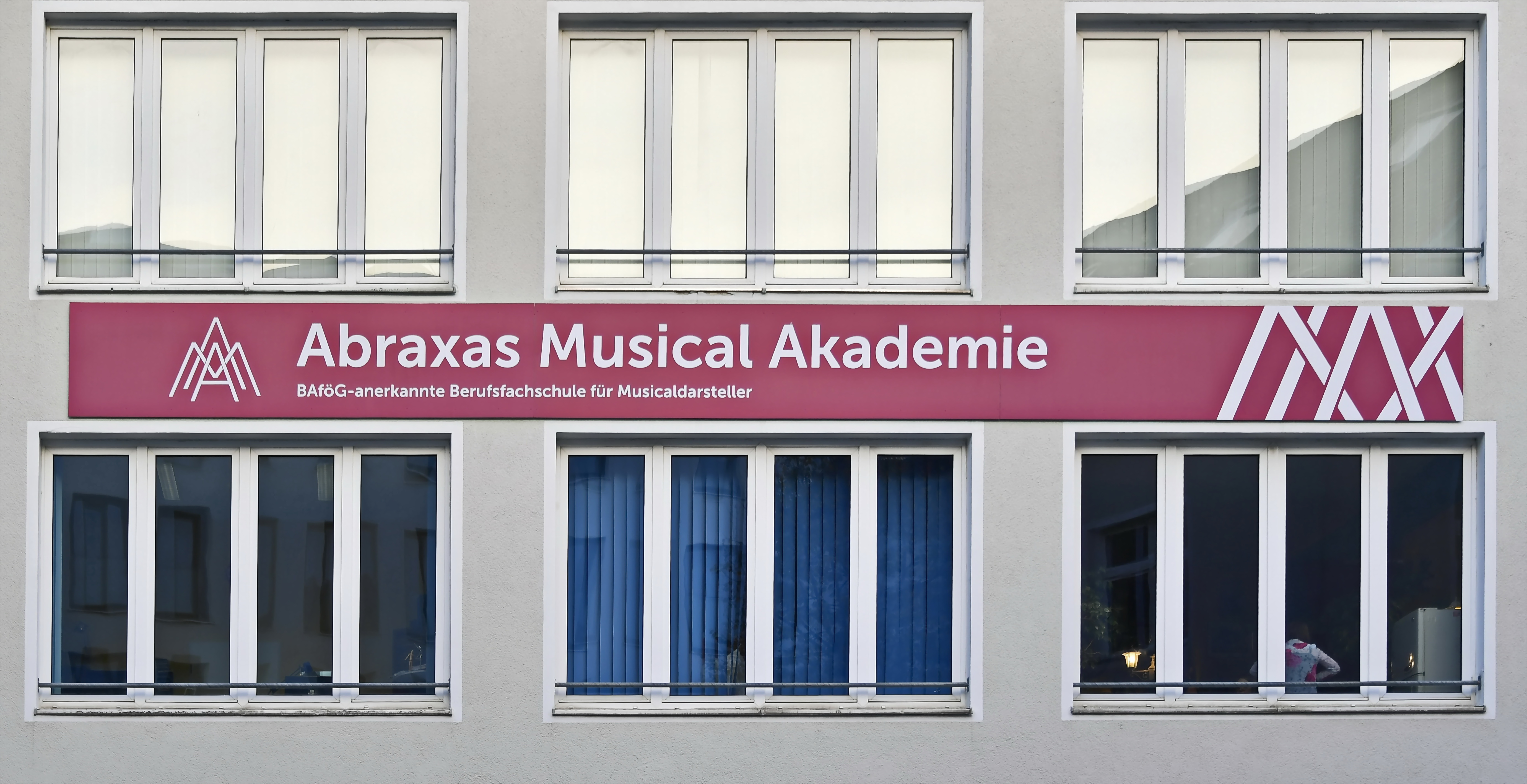 Abraxas Musical Akademie, München, 2019